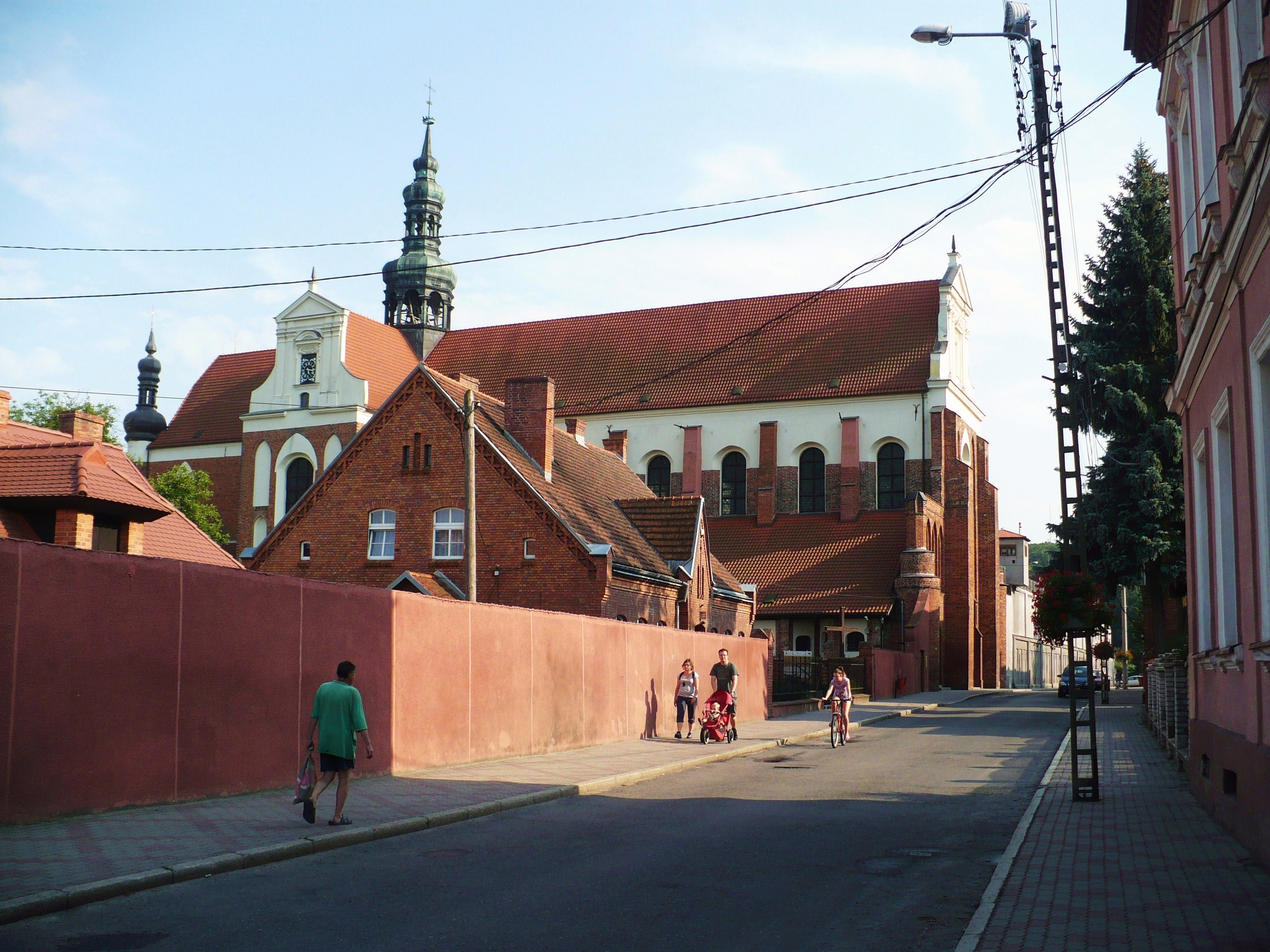 Koronowo, kościół klasztorny cystersów, ob. par. pw. Wniebowzięcia NMP, XIV, 1687